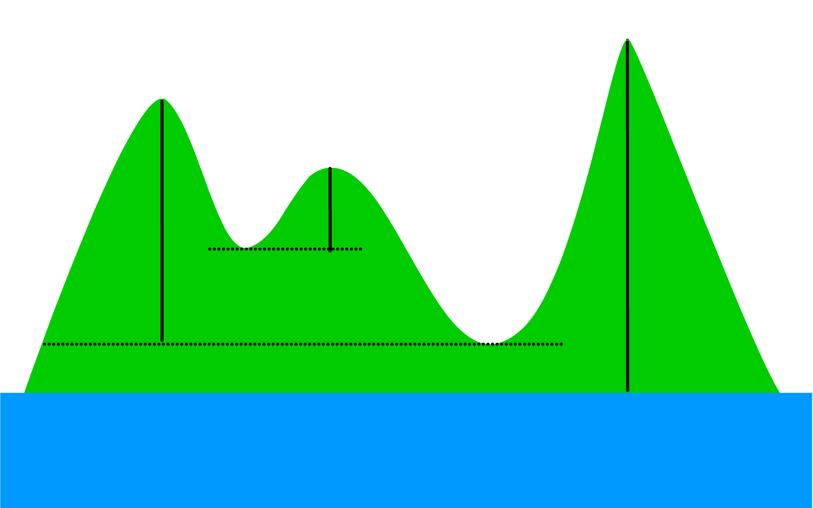 中文（台灣）: 地形突起度